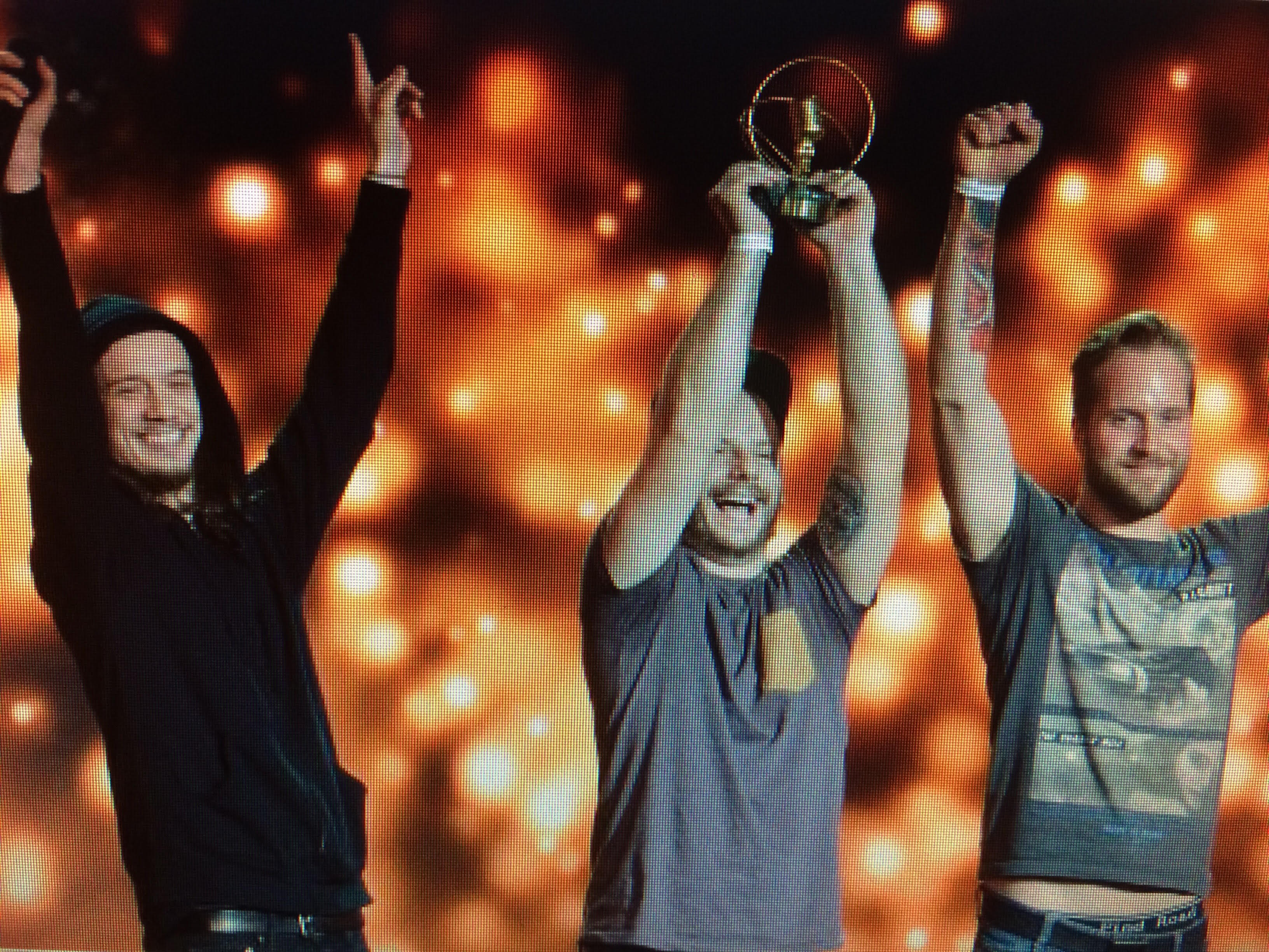 Az év hazai hard rock vagy metalalbuma vagy hangfelvétele Hellish